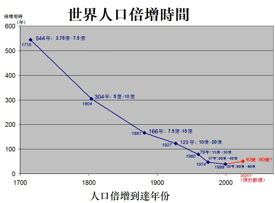 中文（中国大陆）: 世界人口倍增用时图表，繁体版